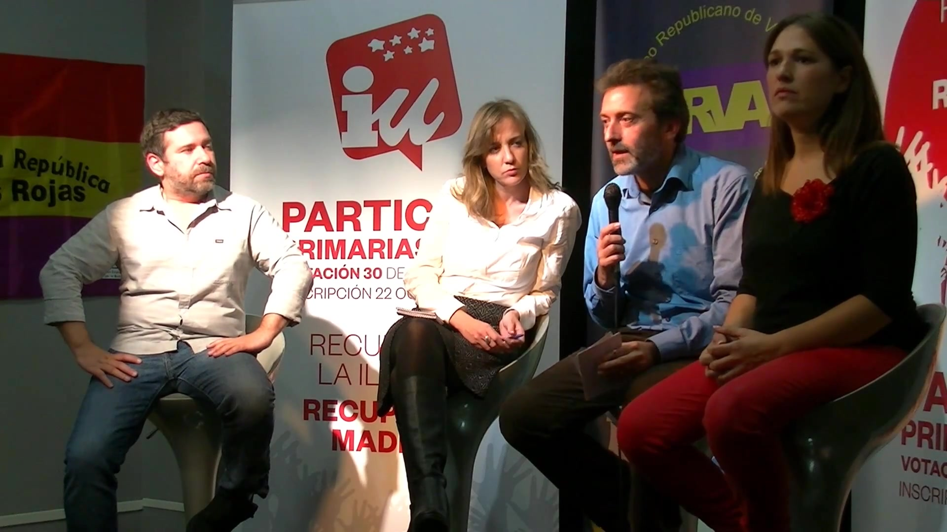 Primarias abiertas a simpatizantes de Izquierda Unida de Madrid. El 7 de Noviembre Tania Sánchez y Mauricio Valiente presentaron su candidatura en el Ateneo Republicano de Vallecas, acompañados de Javier Couso y María Espìnosa